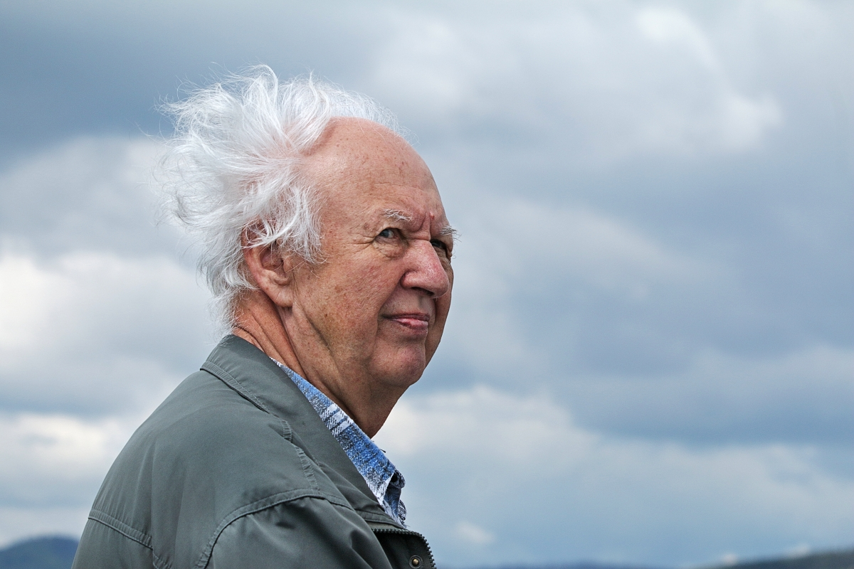 pozorování krajiny okem výtvarníka, zakladatele Oravské galerie